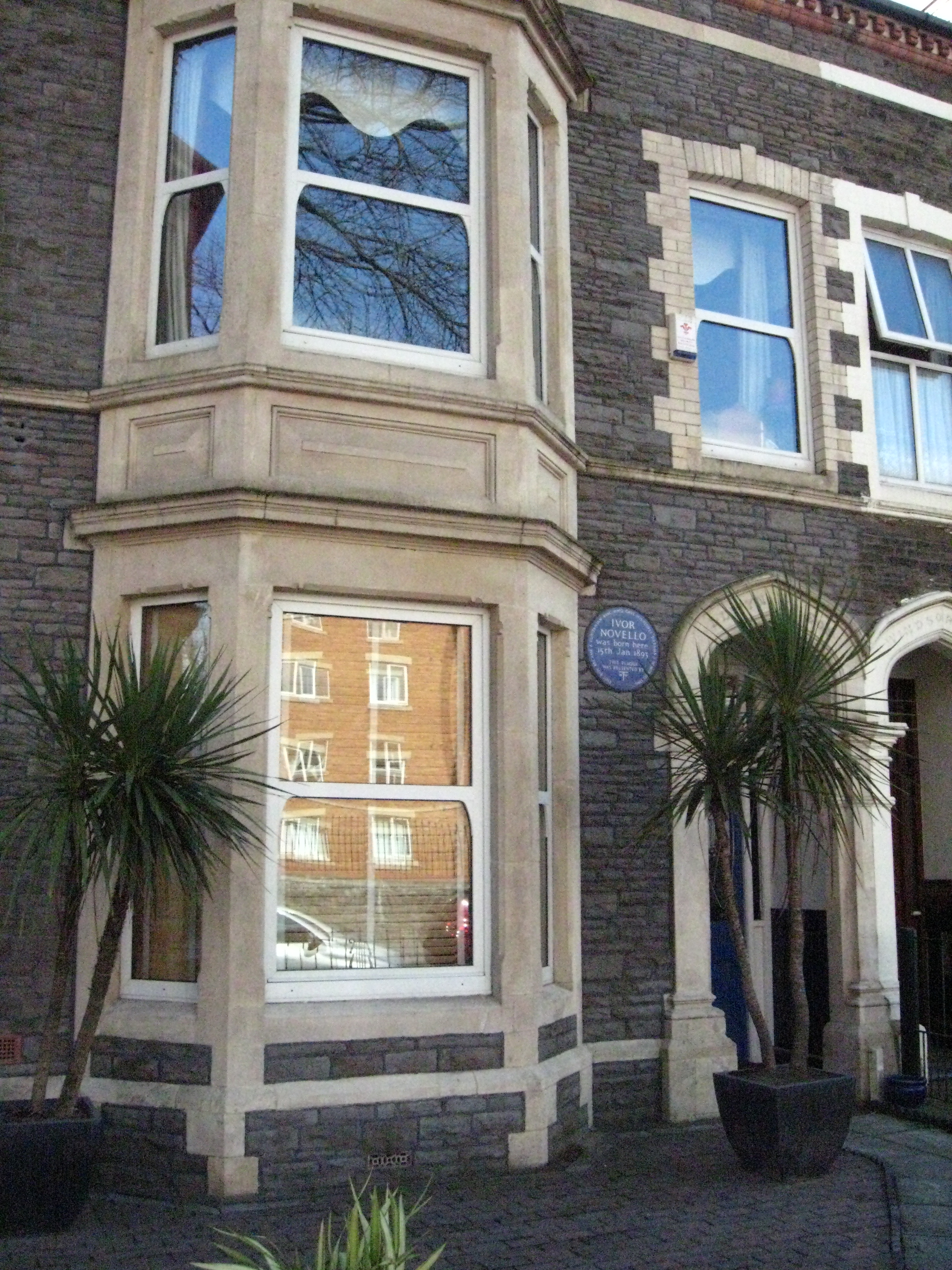 Llywn yr Eos, Cowbridge Road East, Cardiff, Wales.